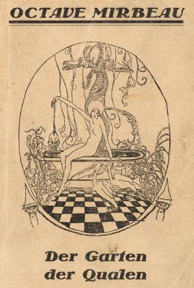 couverture de la traduction allemande de Le Jardin des supplices (Der Garten der Qualen, d'Octave Mirbeau (1848-1917)